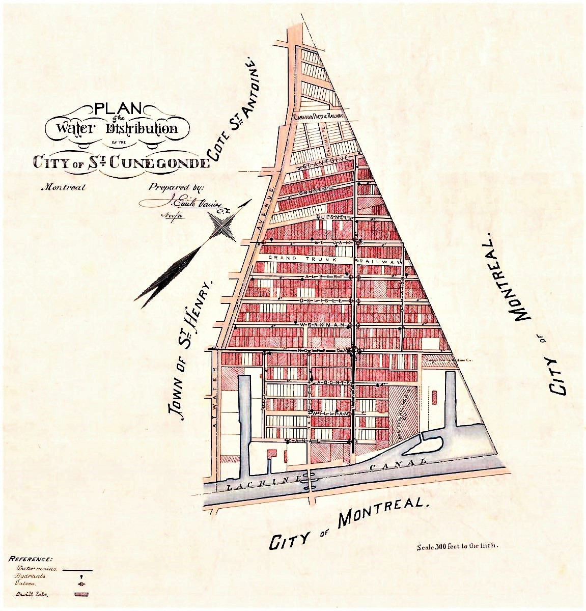 Petite-Bourgogne - Cité de Sainte-Cunégonde, 1890